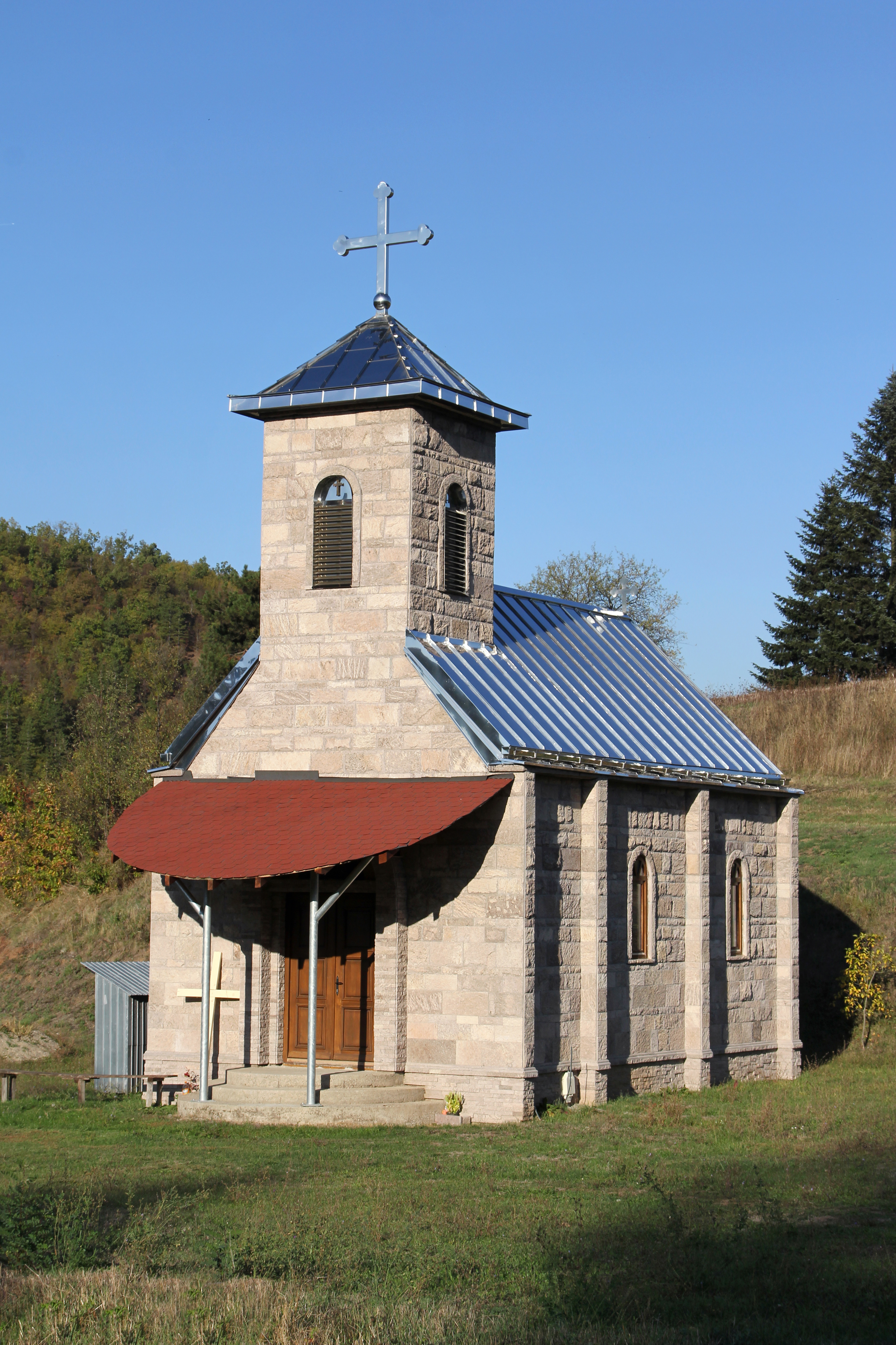 Donja Vrbava kod Gornjeg Milanovca, Crkva Svetog Arhangela Gavrila